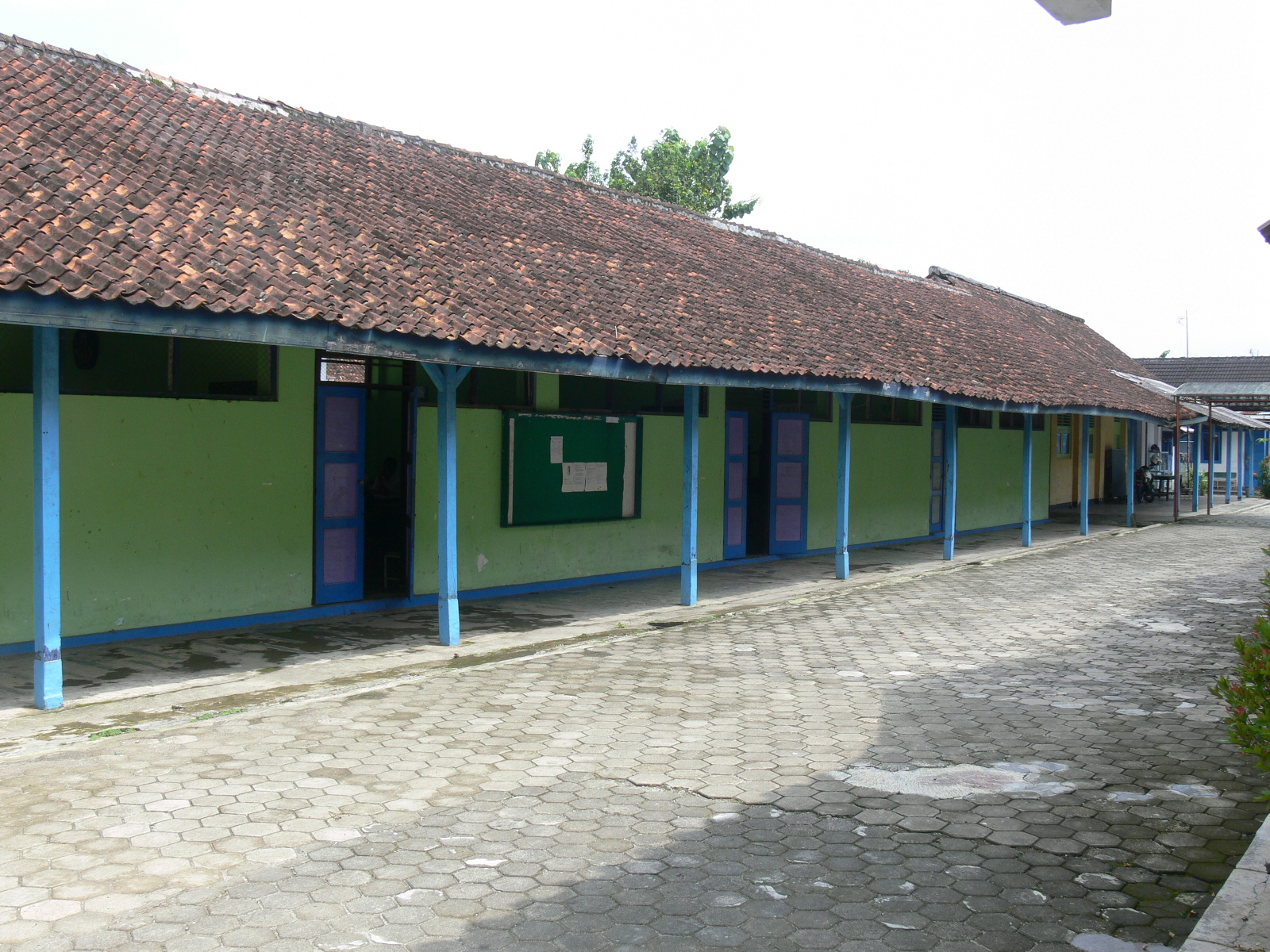 Gedung Sekolah SMTK SETIA Purbalingga